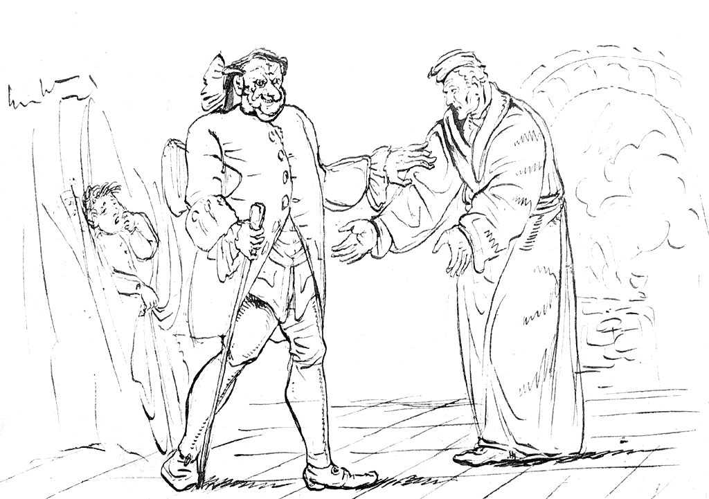 Zeichnung von E.T.A Hoffmann zu seinem Buch "Der Sandmann" Zeichner: E.T.A Hoffmann